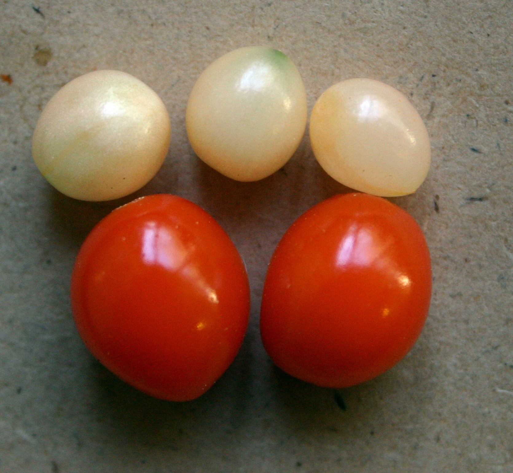 Haemanthus albiflos Jacq. fruits & seeds/reife Früchte mit roter Fruchthülle, darüber vom Fruchtfleisch befreite, fleischige Samen